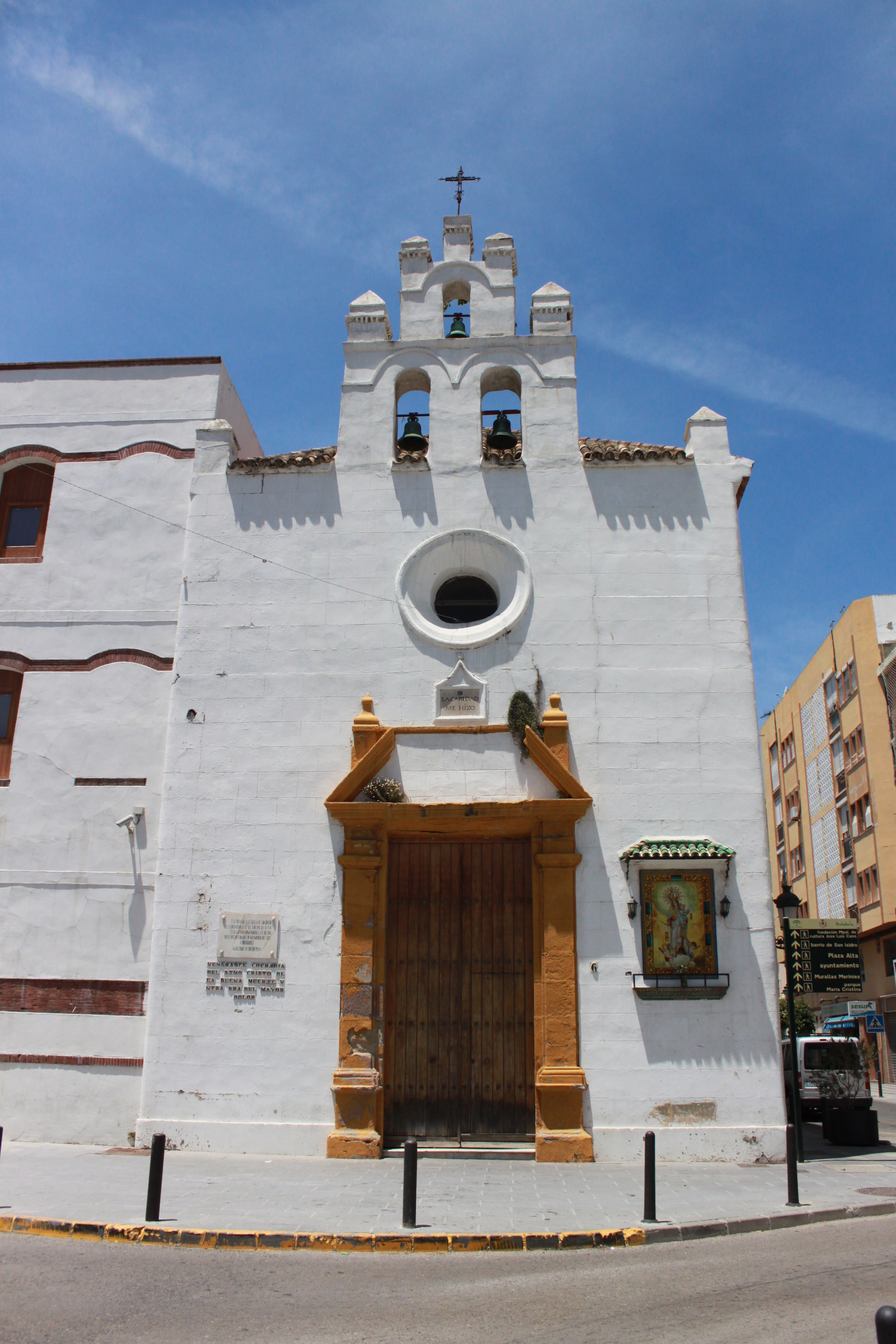 Capilla de la Caridad Fotografía realizada para wikimedia en2006